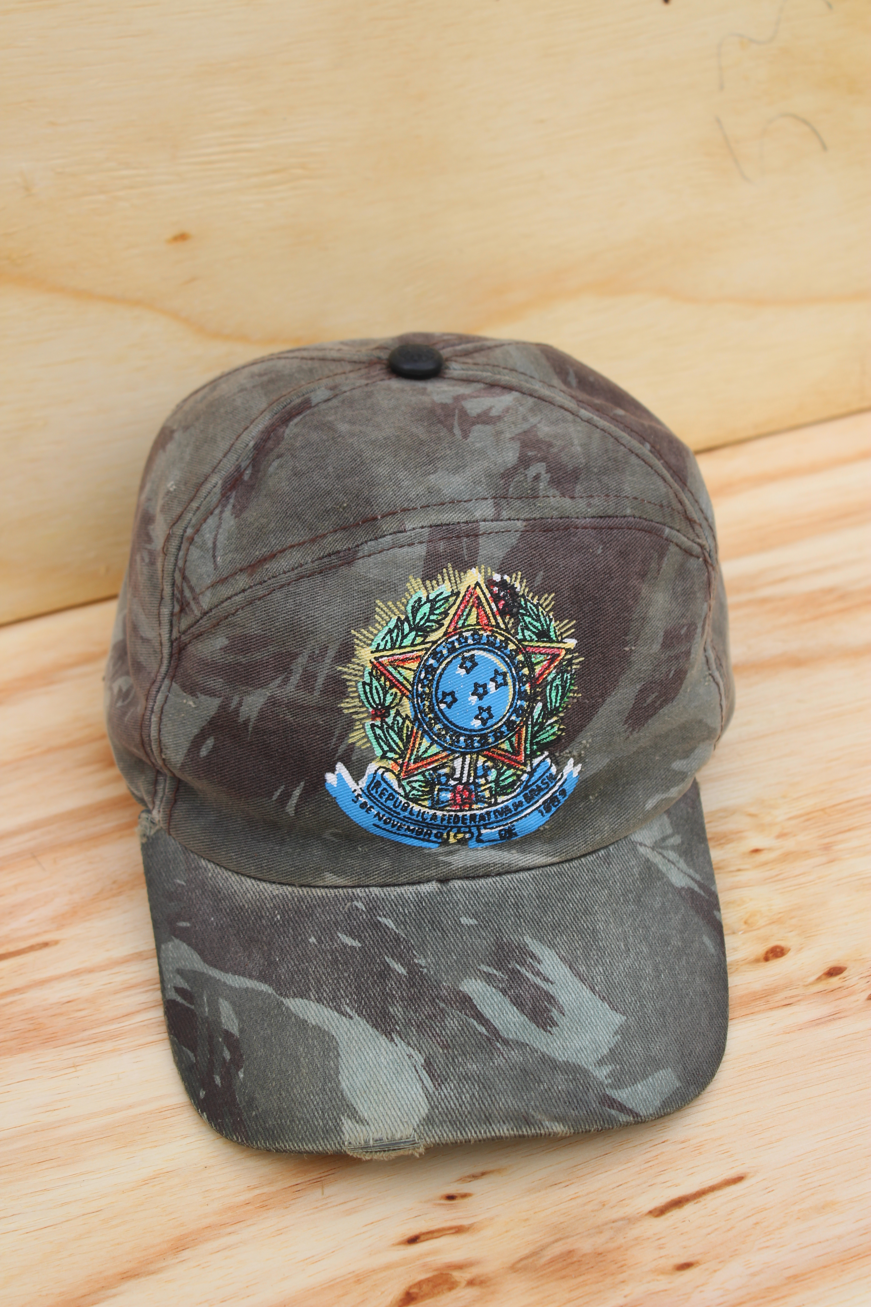 Boné em tecido camuflado com o Brasão Nacional do Brasil, Foi muito comum na moda popular dos anos 1990.